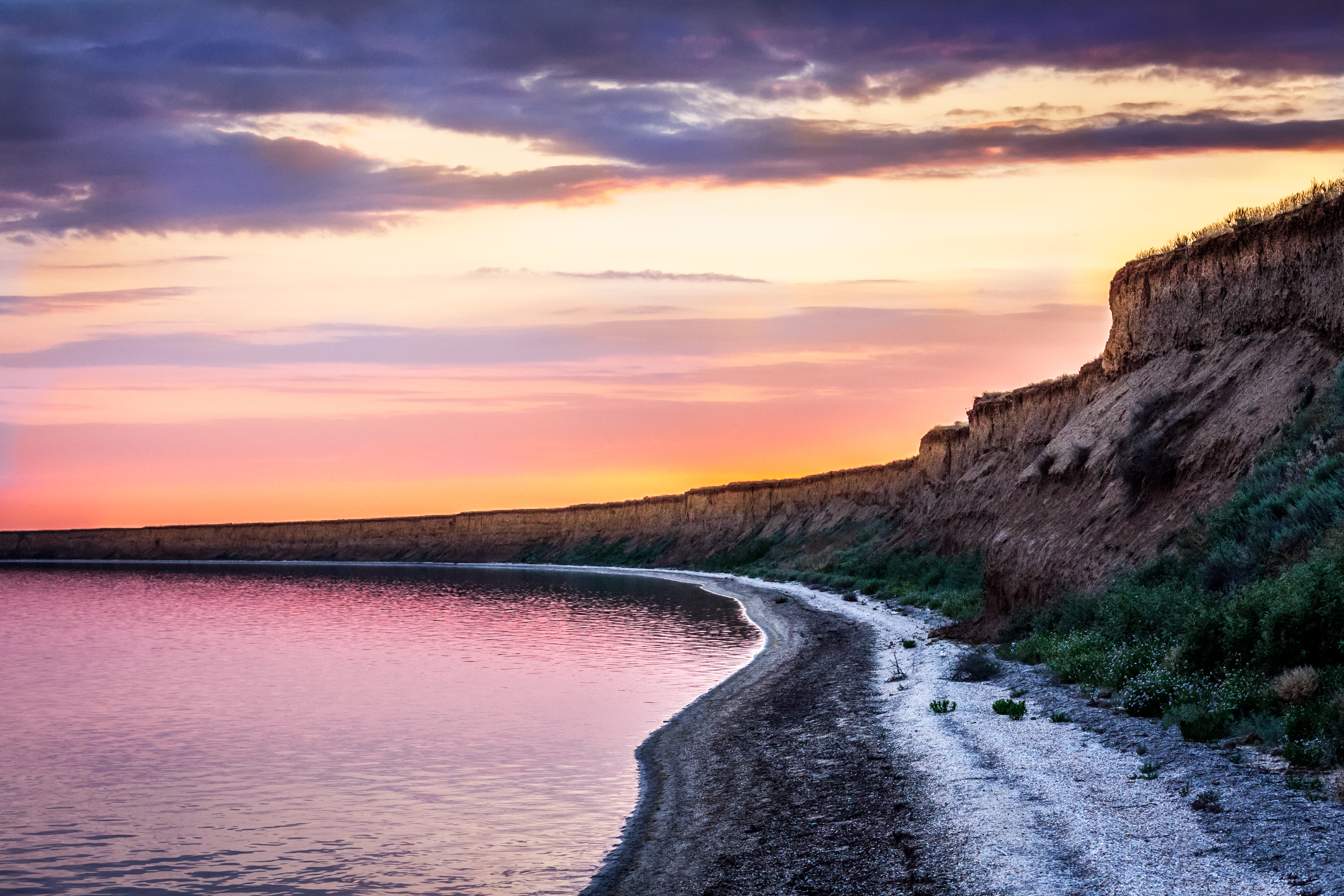 Азово-Сиваський, Генічеський р-н, вул. Петровського 54, м. Генічеськ; Новотроїцький райони